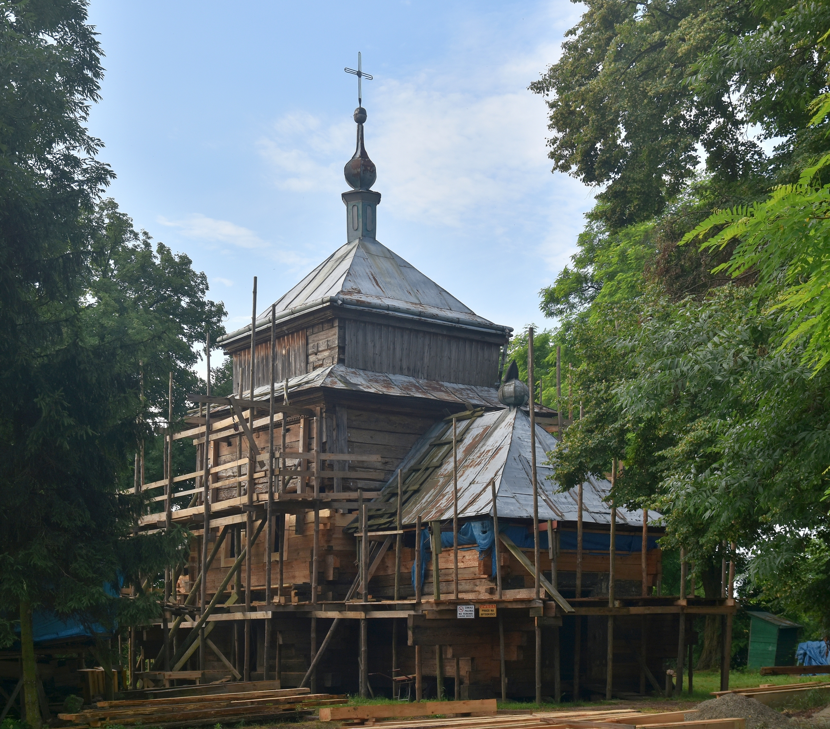 wieś Leżachów